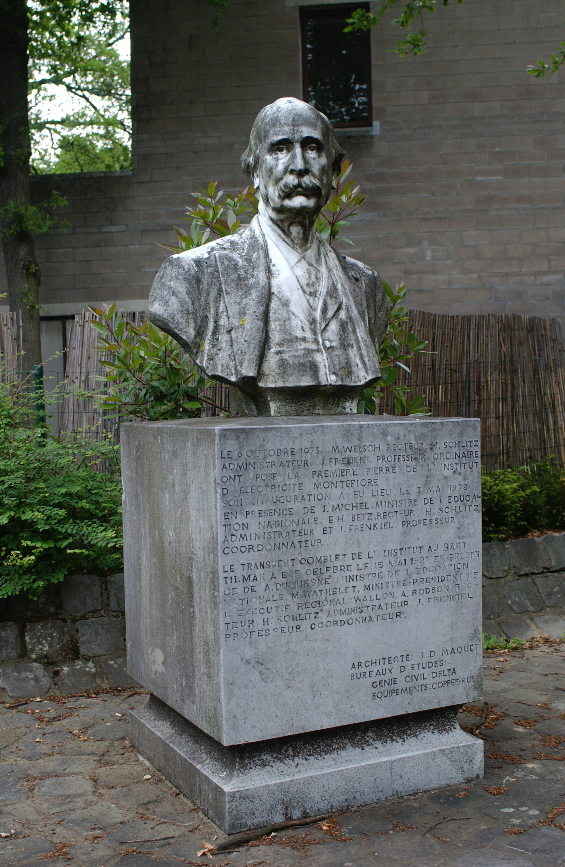 Thomas Vinçotte, "Buste de Georges Montefiore-Levi", 1904, Université de Liège.